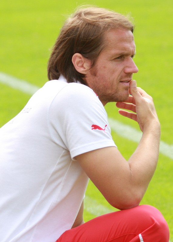 VfB-Trainer Thomas Schneider, hier noch als U17-Trainer. Aufgenommen von